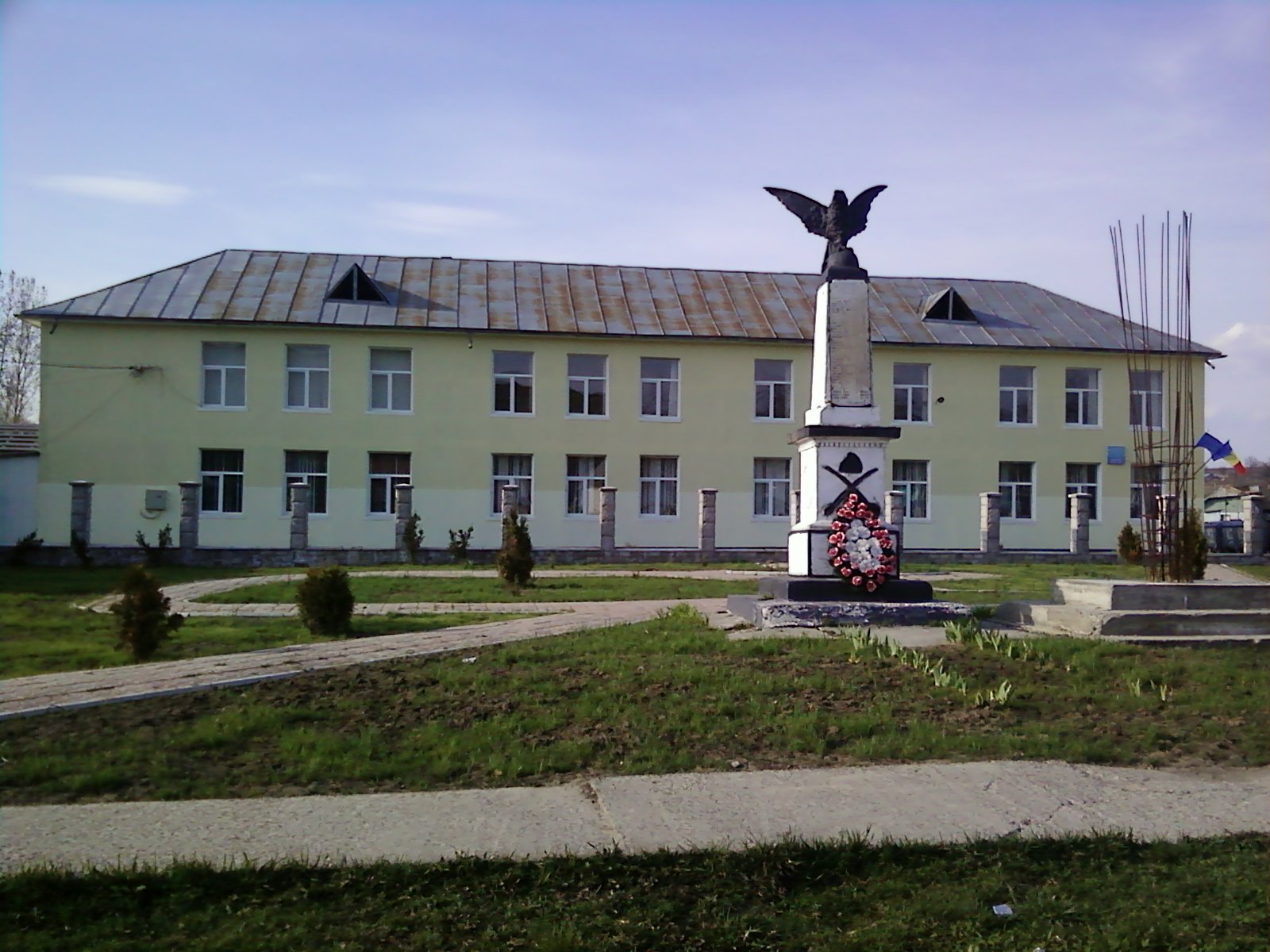 la escuela y el monumento de gâdinţi